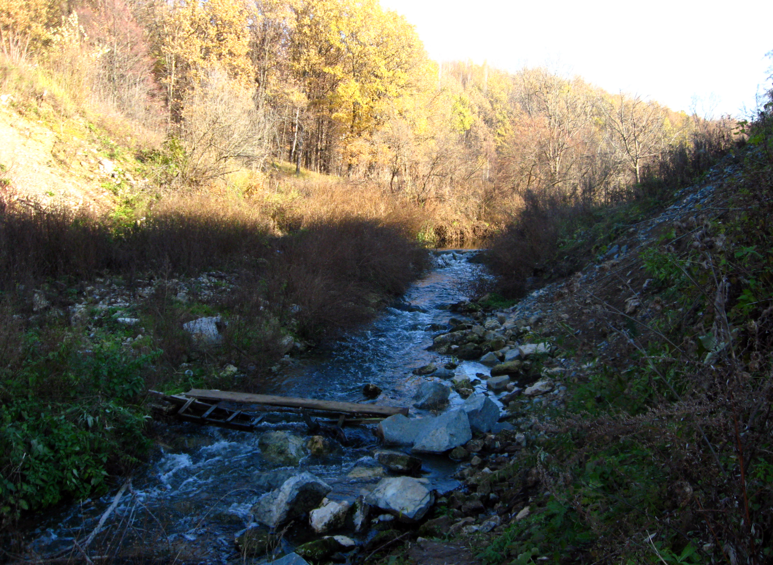 Река Каска около железнодорожного моста